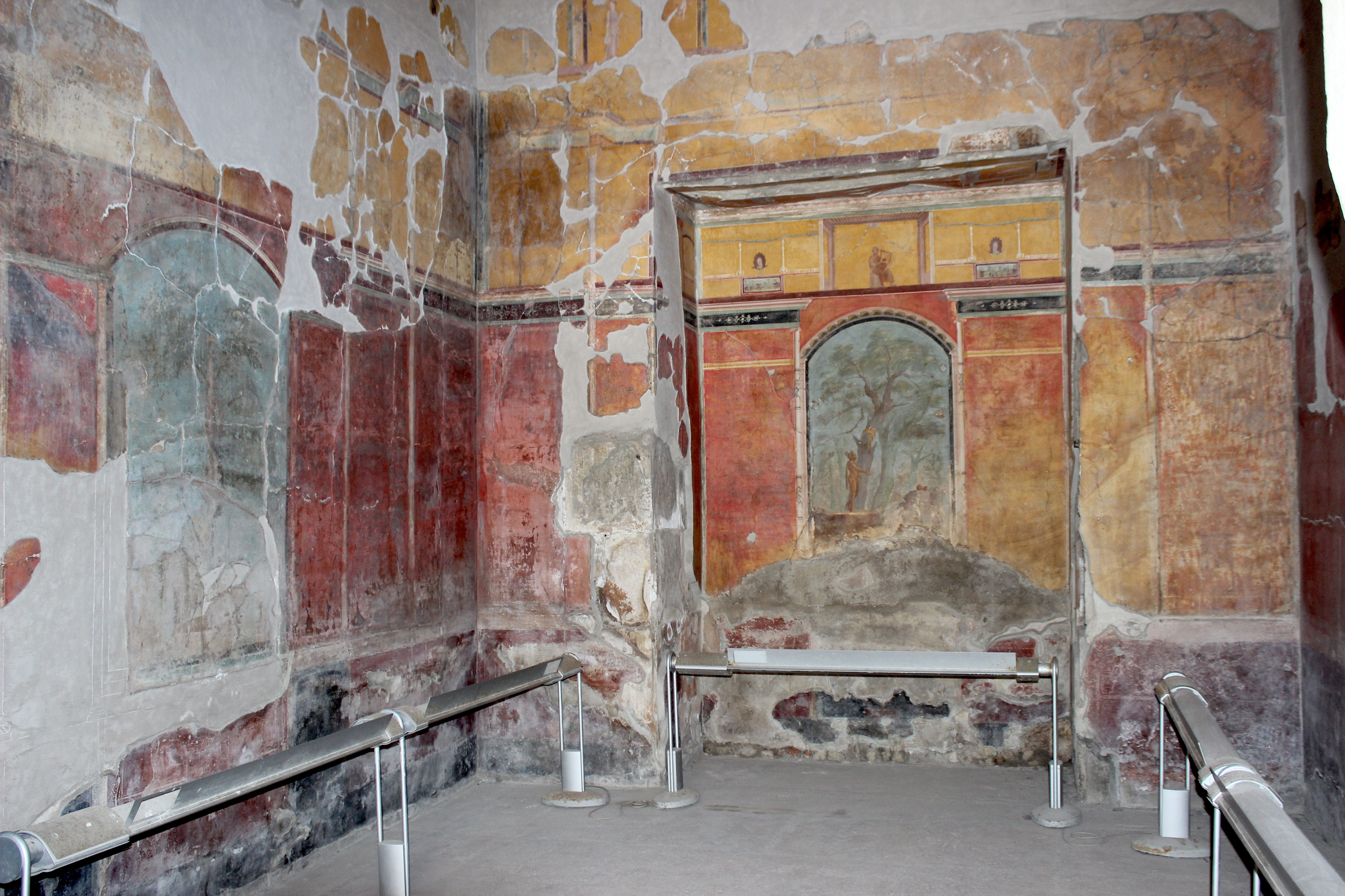 Villa Poppaea. Calidarium en las Termas.